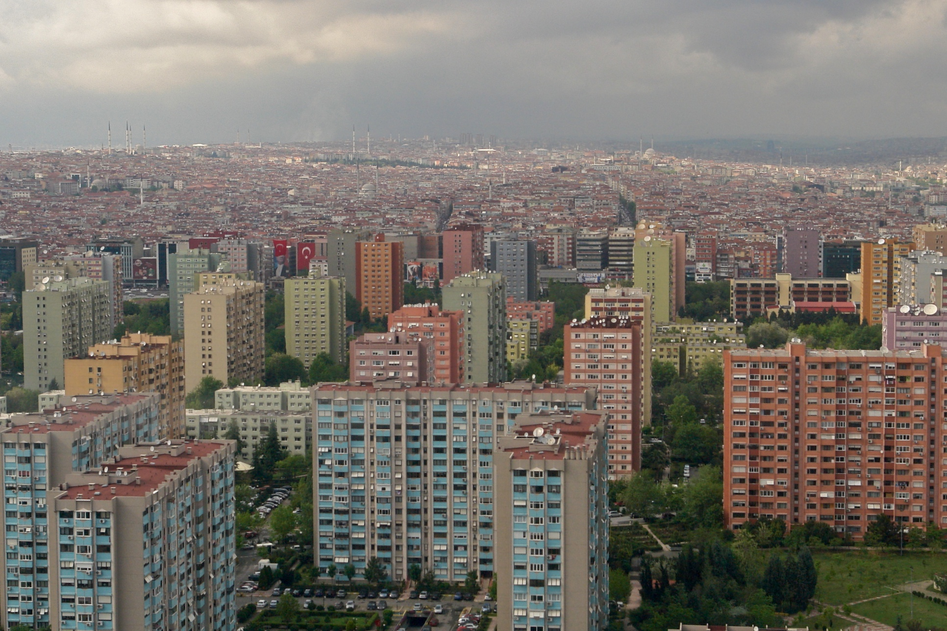 Istanbul